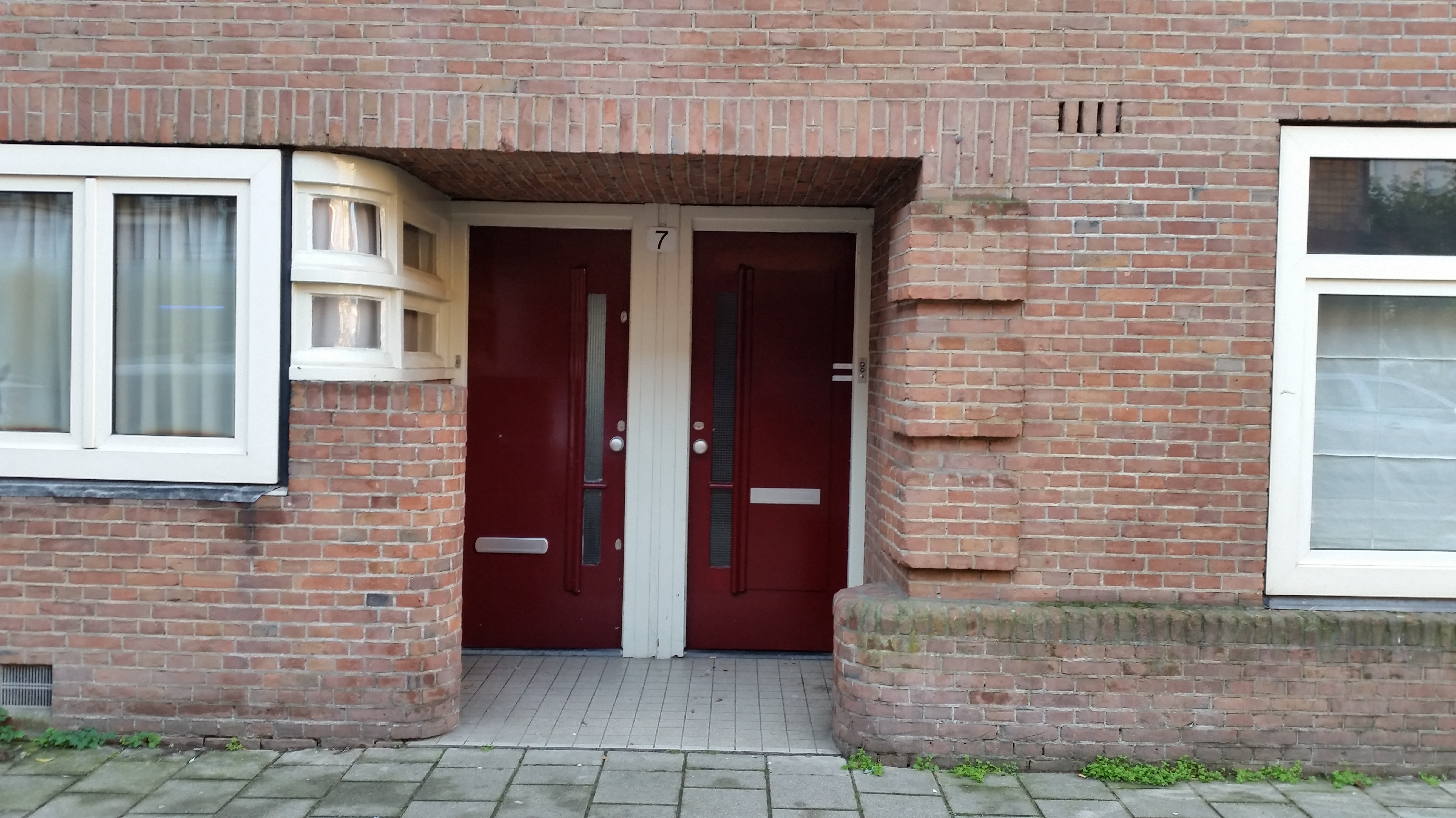 Krommertstraat 7, ingang